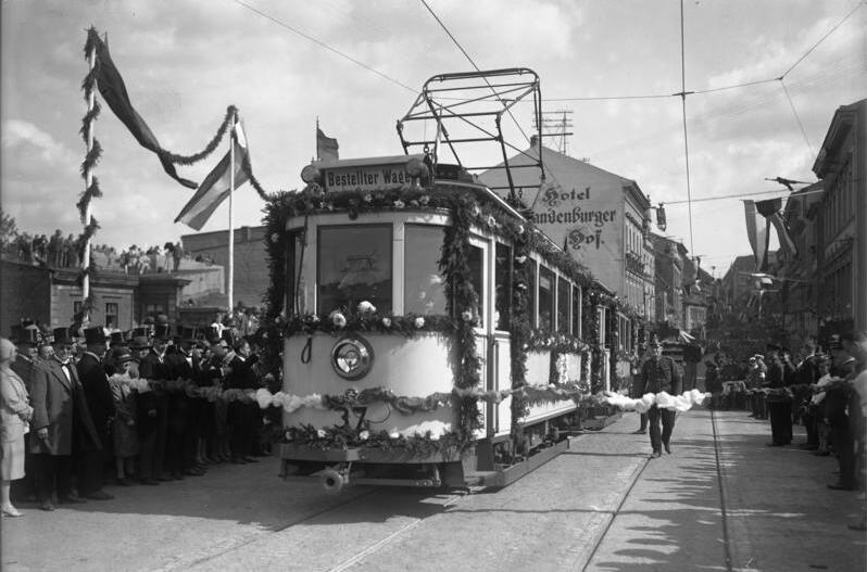 Die Jahrtausendfeier der Stadt Brandenburg/Havel! Die feierliche Einweihung der "Jahrtausend-Brücke" in Brandenburg/Havel. Die mit Girlanden geschmückte erste Elektrische zerreißt das Band bei der Überfahrt über die neue Brücke.